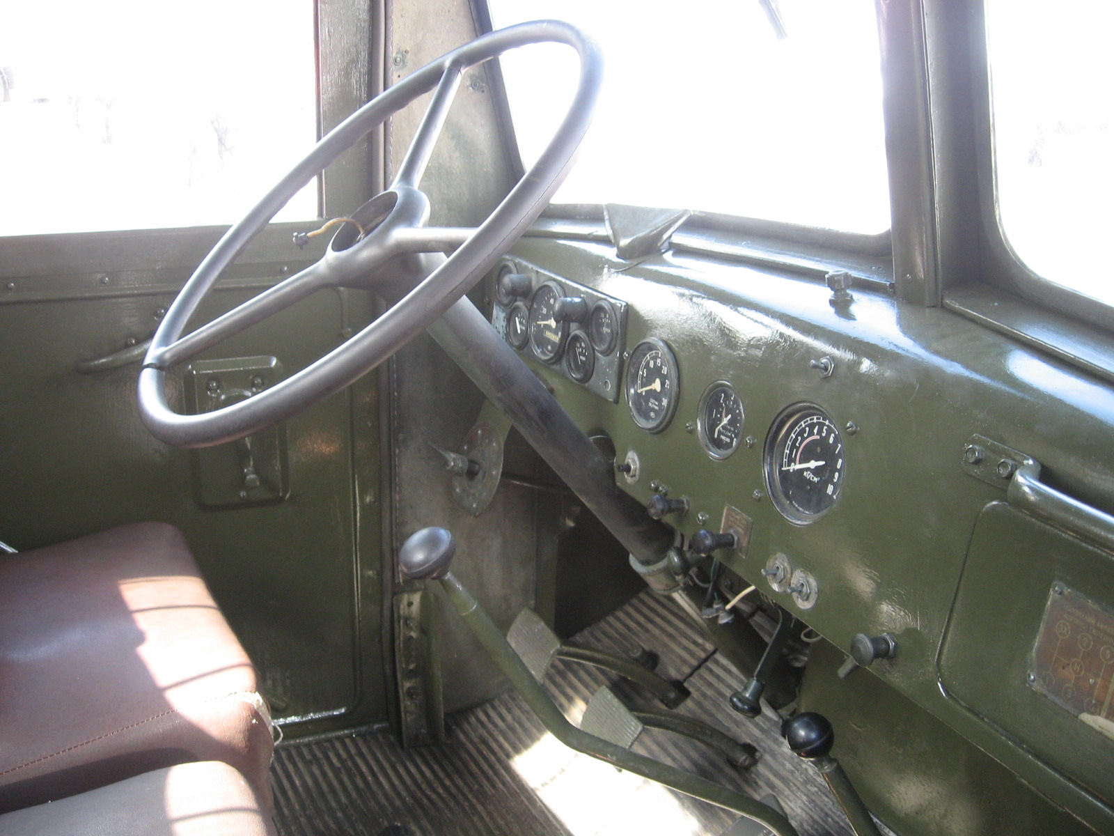 МАЗ-502 Салон